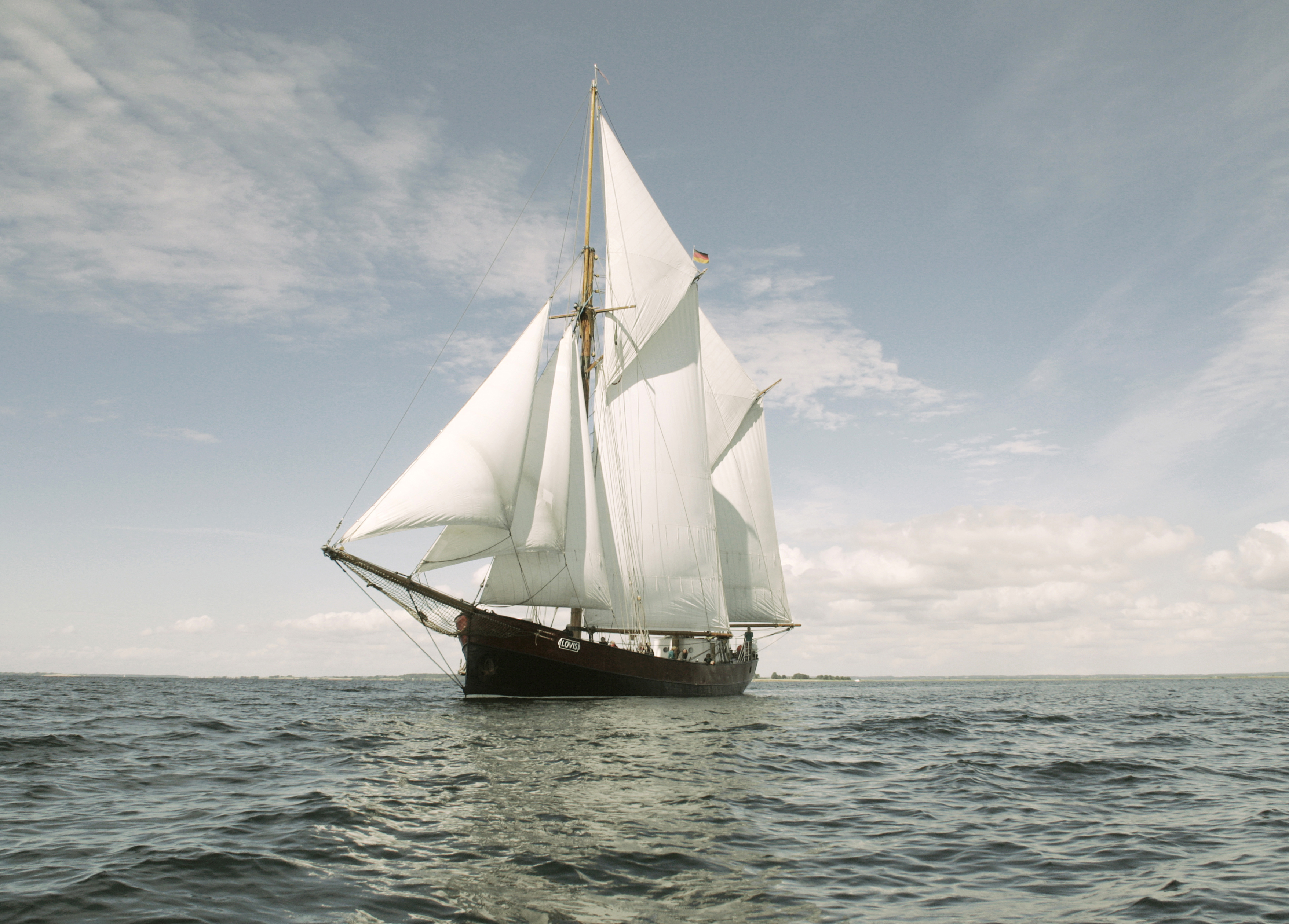 Lovis südlich der dänischen Insel Avernakø